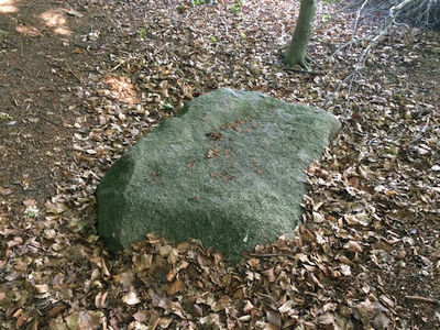 Der Teufelstein im westmünsterländischen Erle, in der Bauerschaft Östrich gelegen. Schauplatz örtlicher Sagen und Spukgeschichten, vermutlich heidnischer Kult- und Versammlungsplatz.